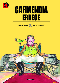 Garmendia errege